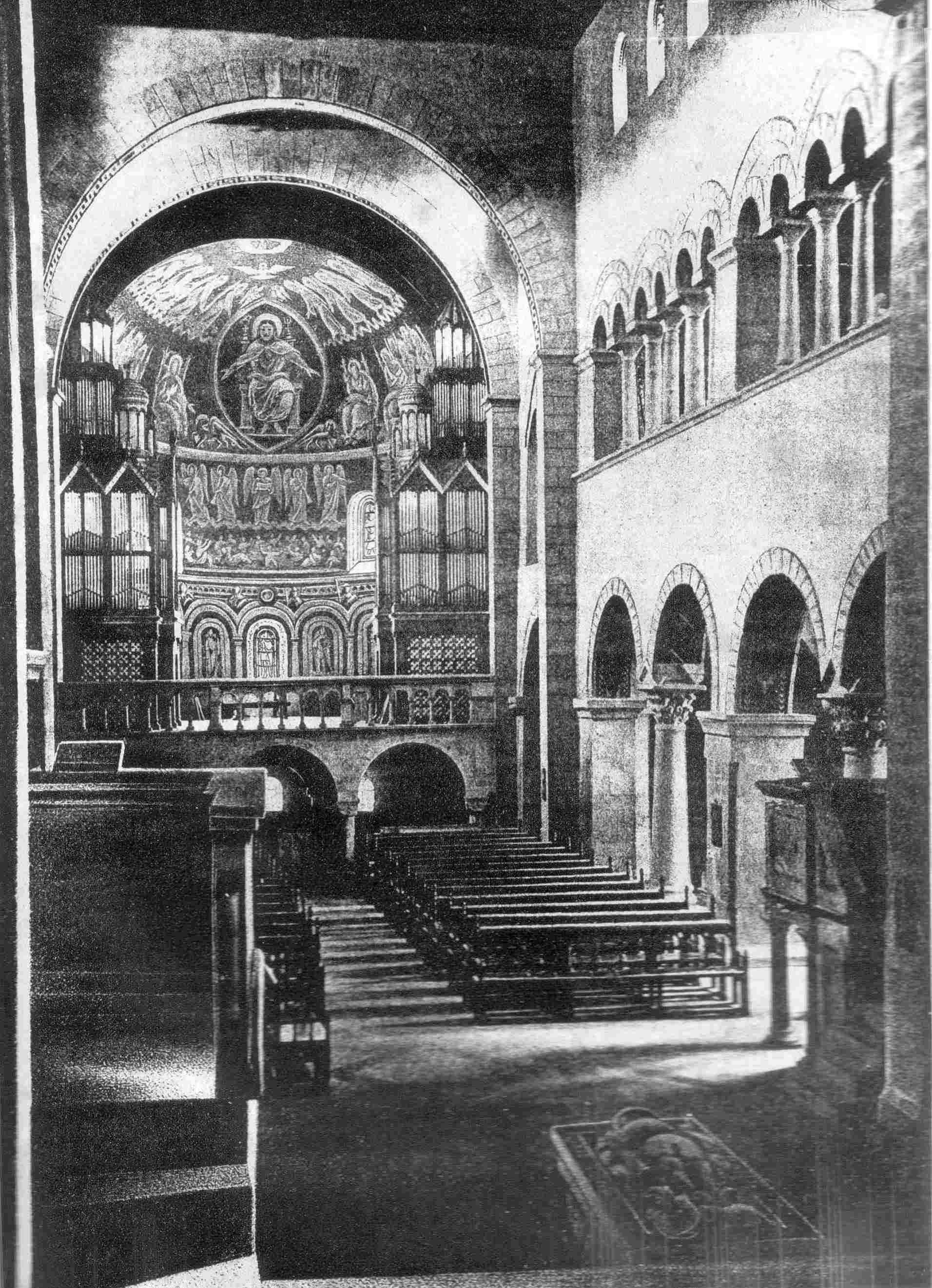 Blick zum Westchor und zur Orgel in der Stiftskirche Gernrode